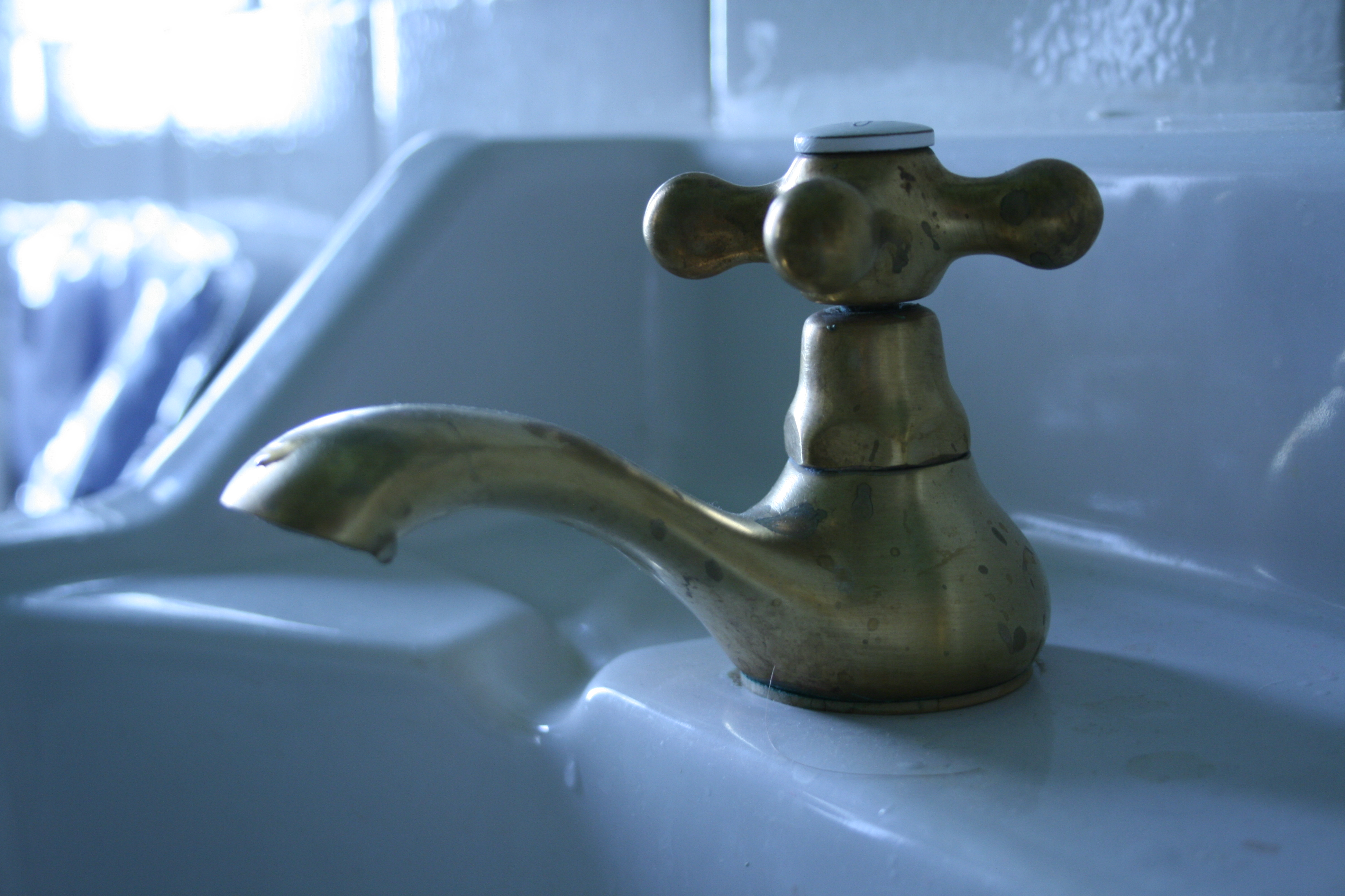 Grifería - Grifo (cuarto de baño)